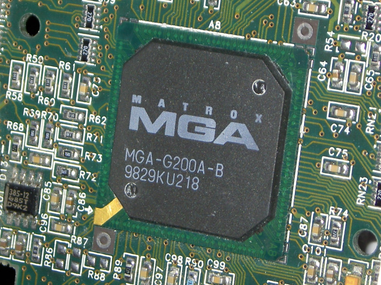 Matrox MGA-G200 (0.35um process ver.)